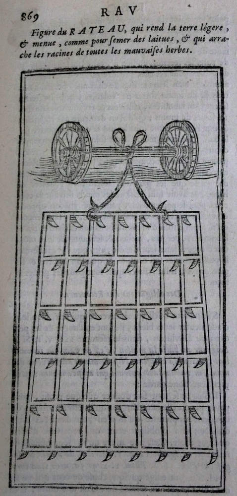 Herse inventée par Gabriel Calloet-Kerbrat